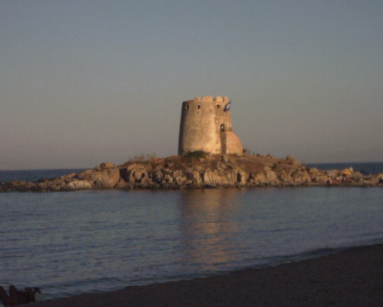 torre di bari sardo sardegna italia